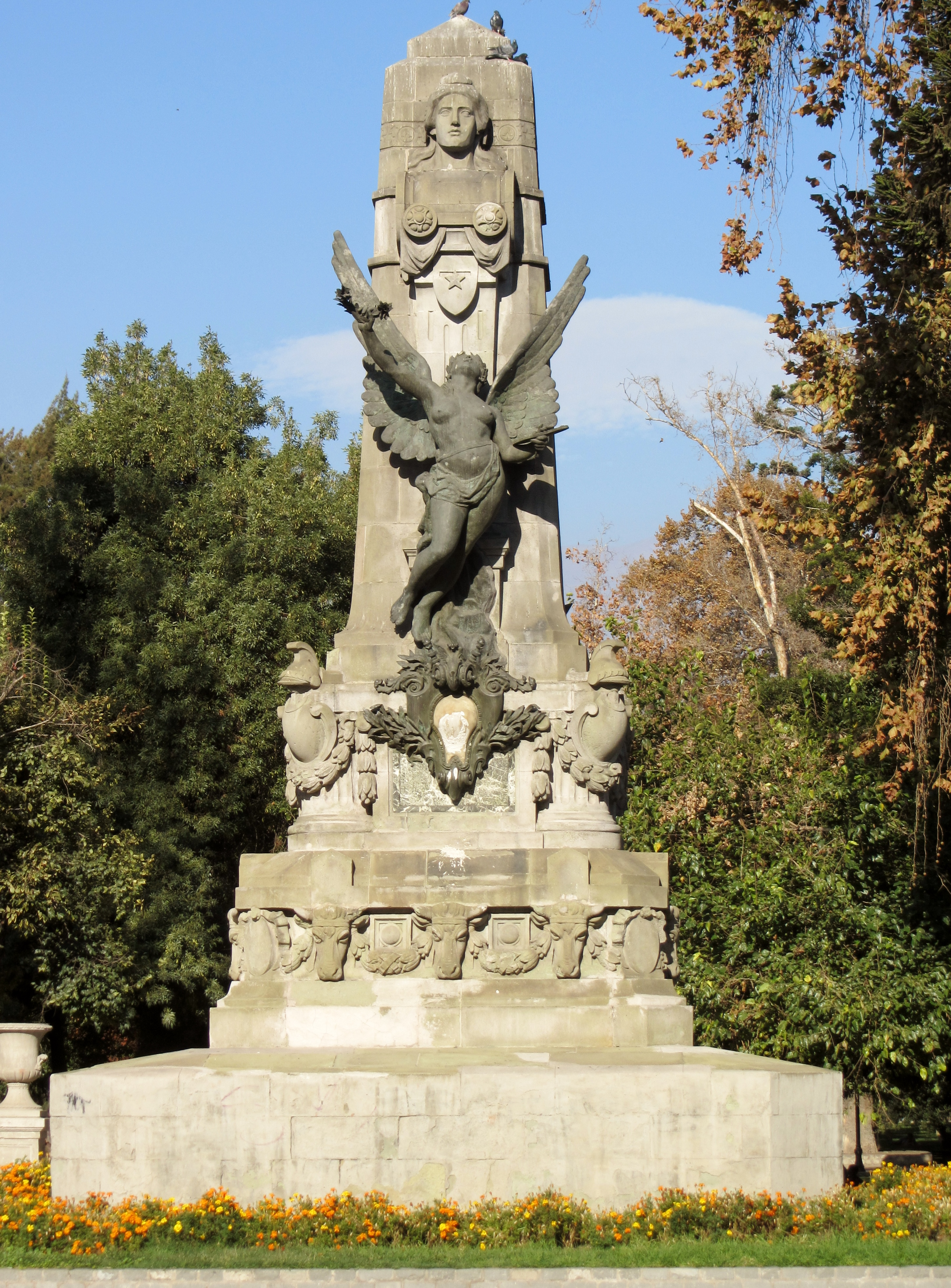 Monumento de la Colonia Francesa al Centenario de la Independencia, Parque Forestal, Santiago de Chile